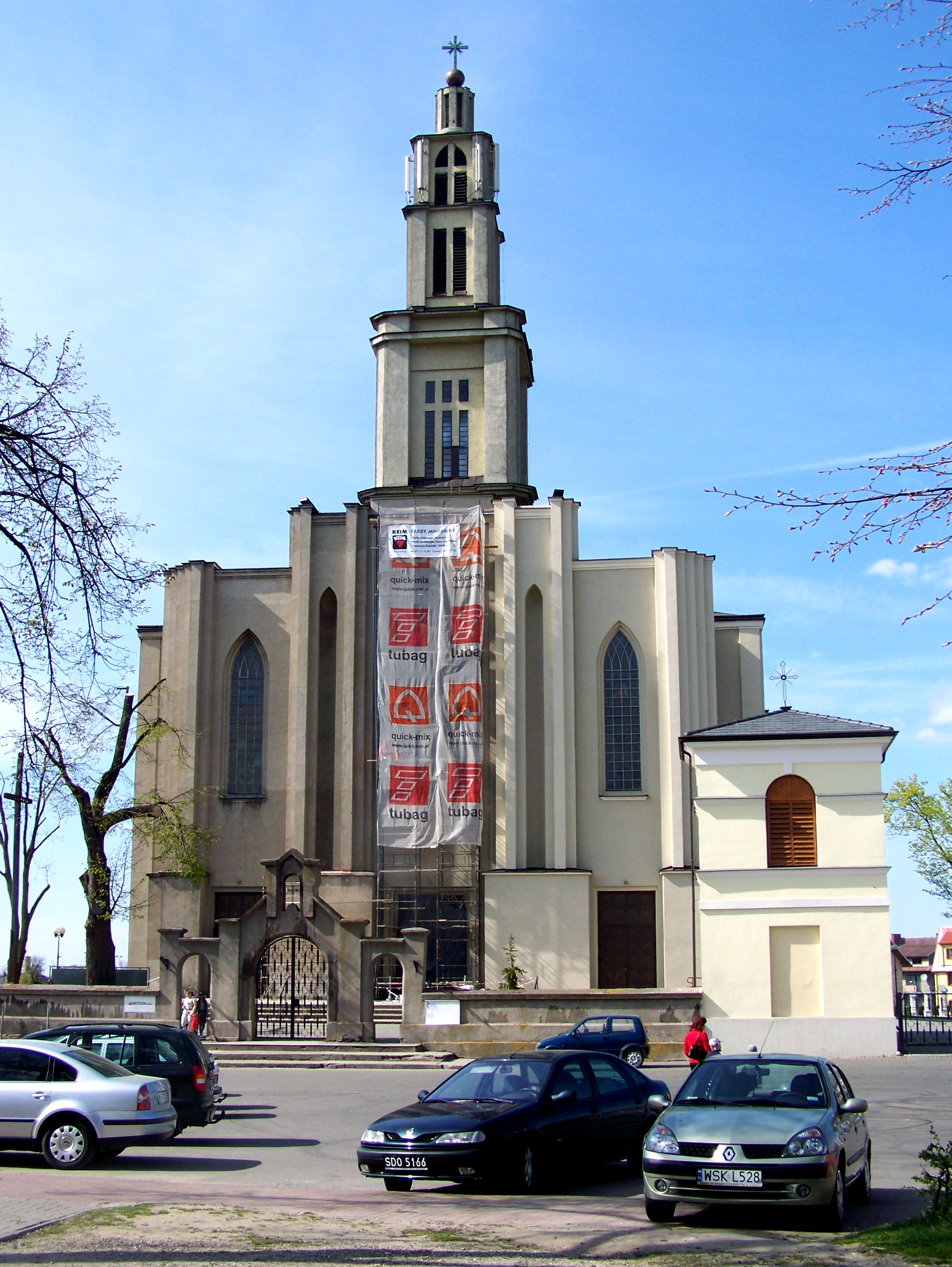 Kościół Konkatedralny pw. Niepokalanego Serca Najświętszej Marii Panny w Sokołowie Podlaskim